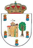 Escudo de Ayuelas (España)